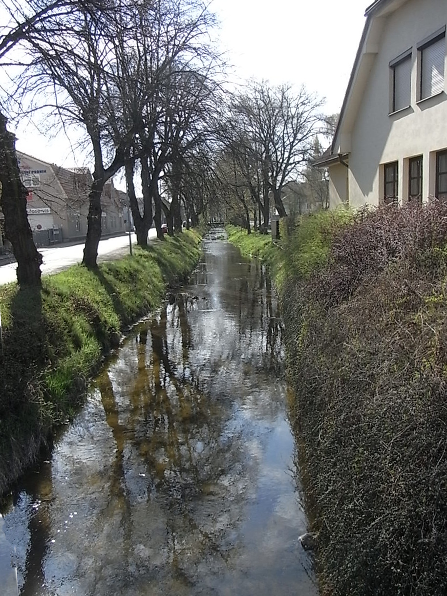 Die Zubřina in Taus (CZ). Links die Havlíčkova-Straße.